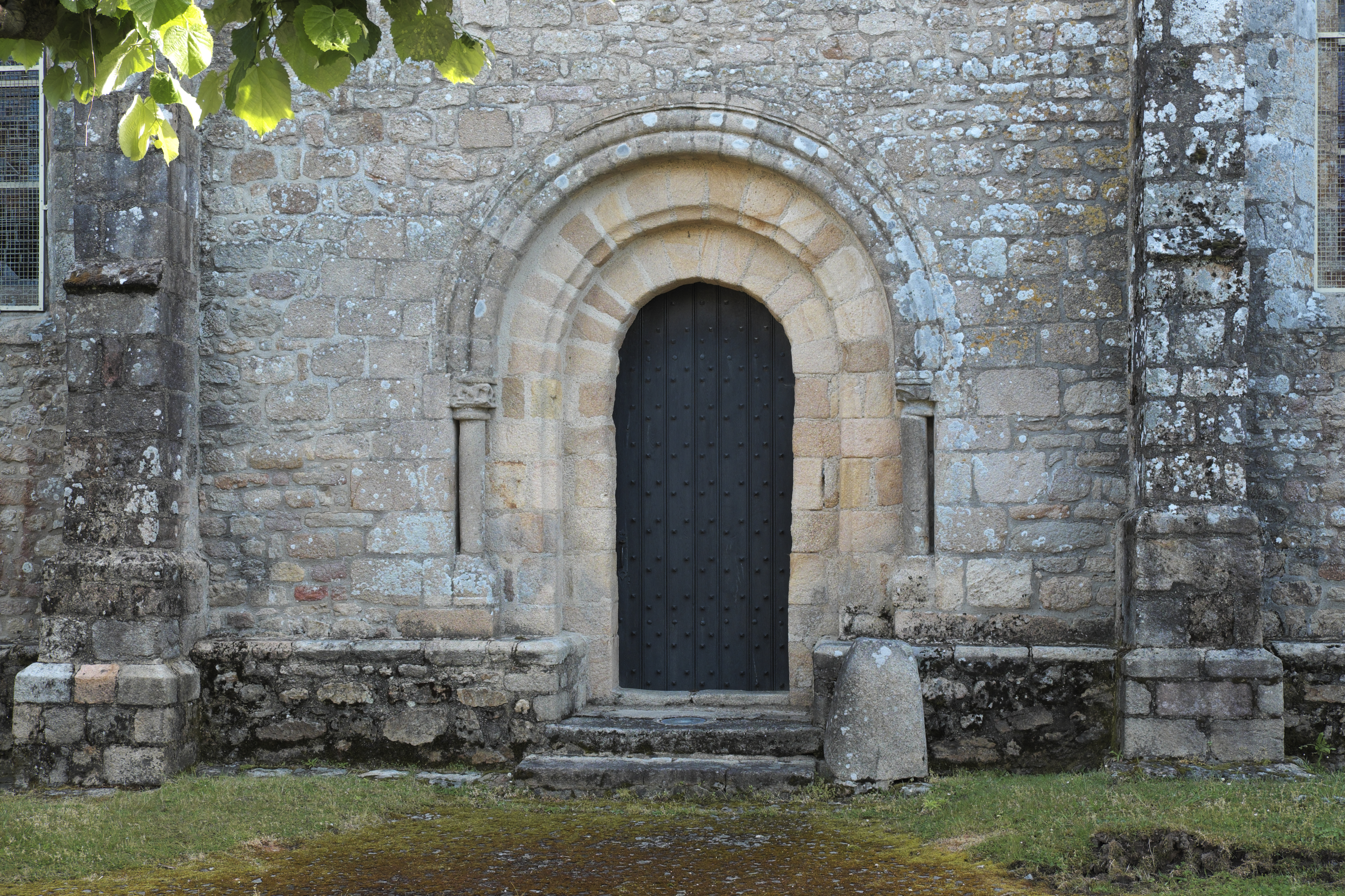 Kirche Notre-Dame-de-Joie in Merlevenez im Département Morbihan (Region Bretagne/Frankreich), Seitenportal